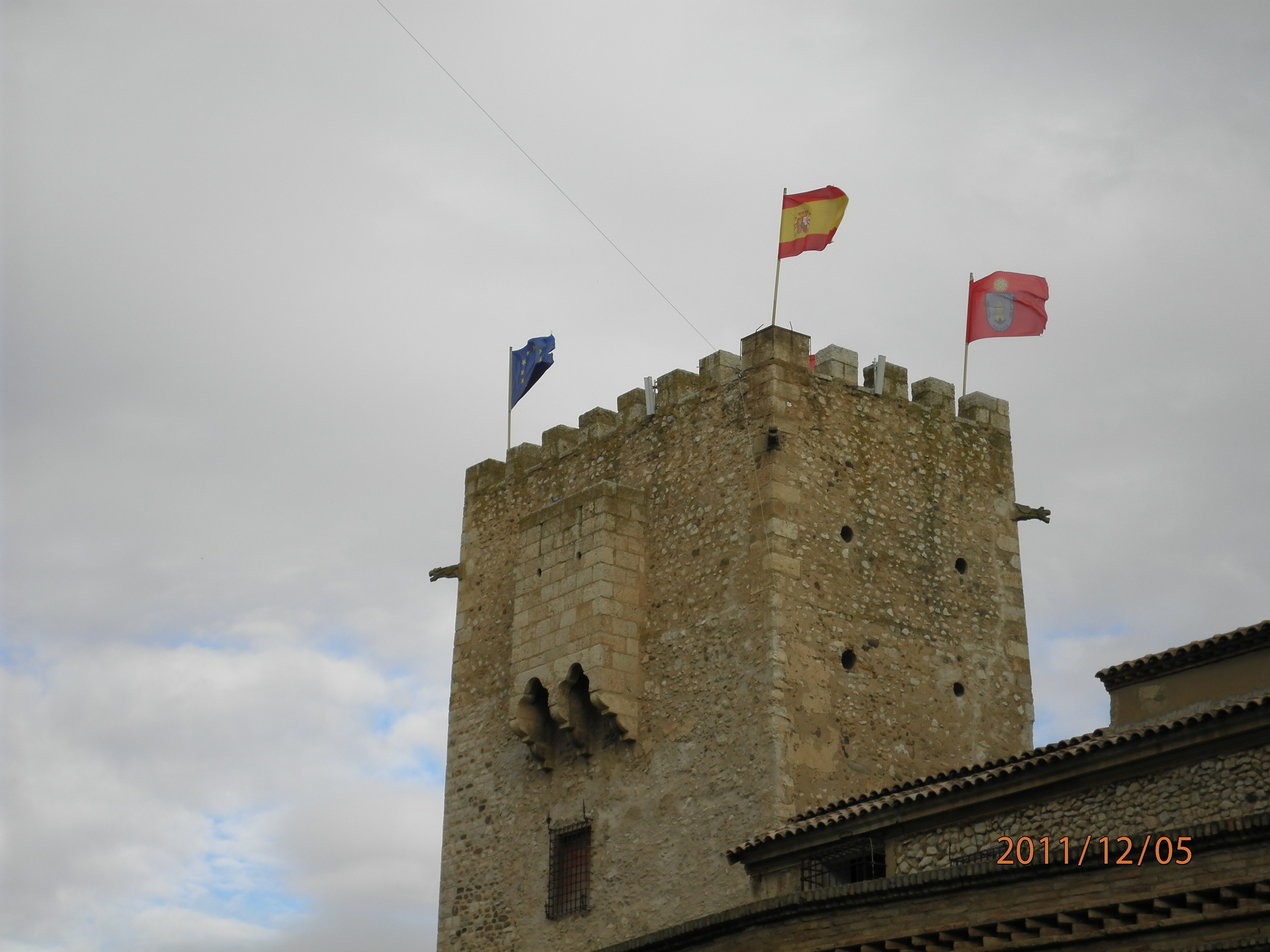 Aragonés: Frente a la iglesia parroquial de San Juan se levanta desde 1128 el histórico castillo de la localidad. En él fue nombrado Fernando el Católico como Lugarteniente General del Reino por las Cortes de Zaragoza, en 1464.